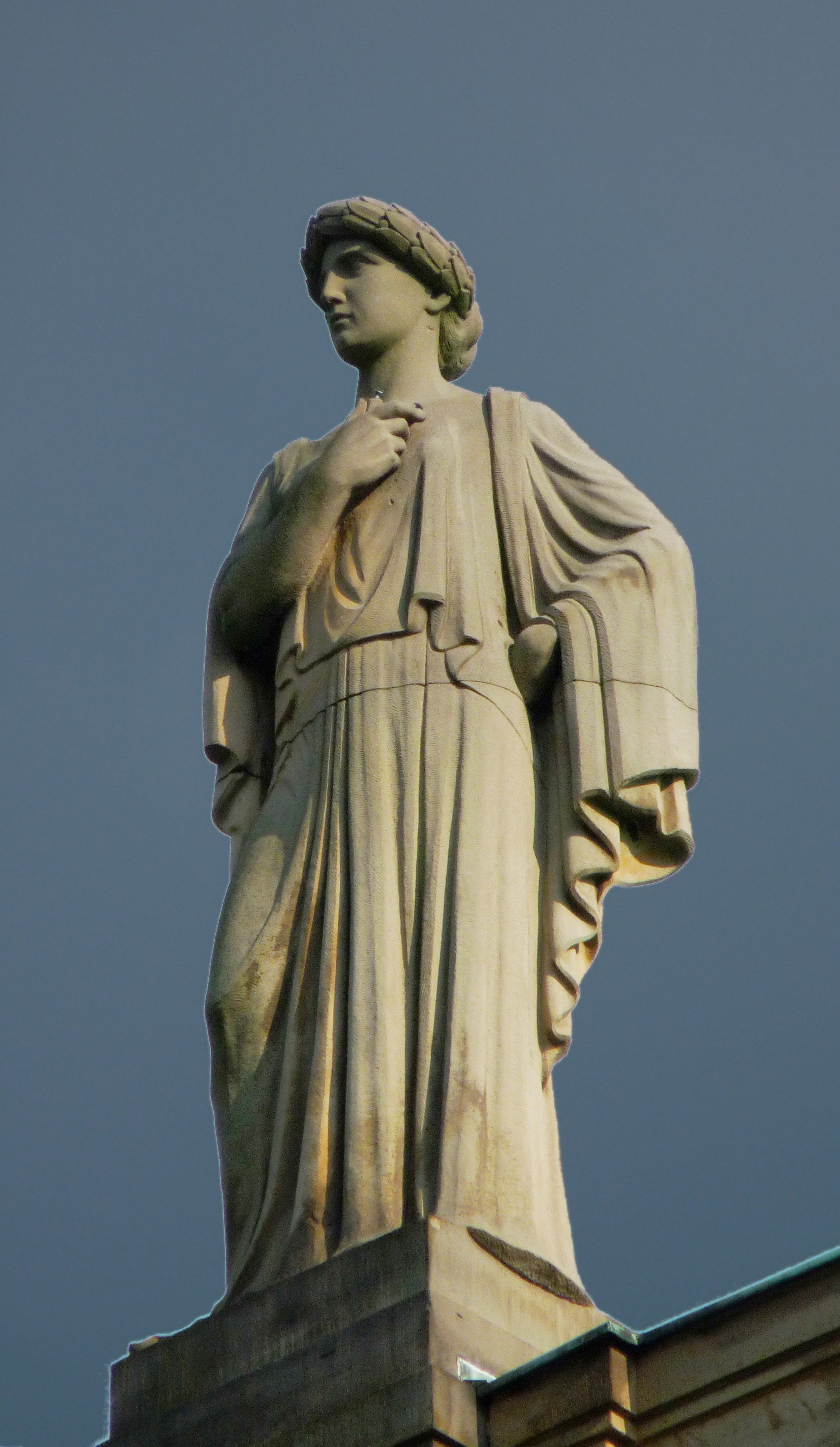 Stuttgart - Staatstheater - Apsis-Skulptur